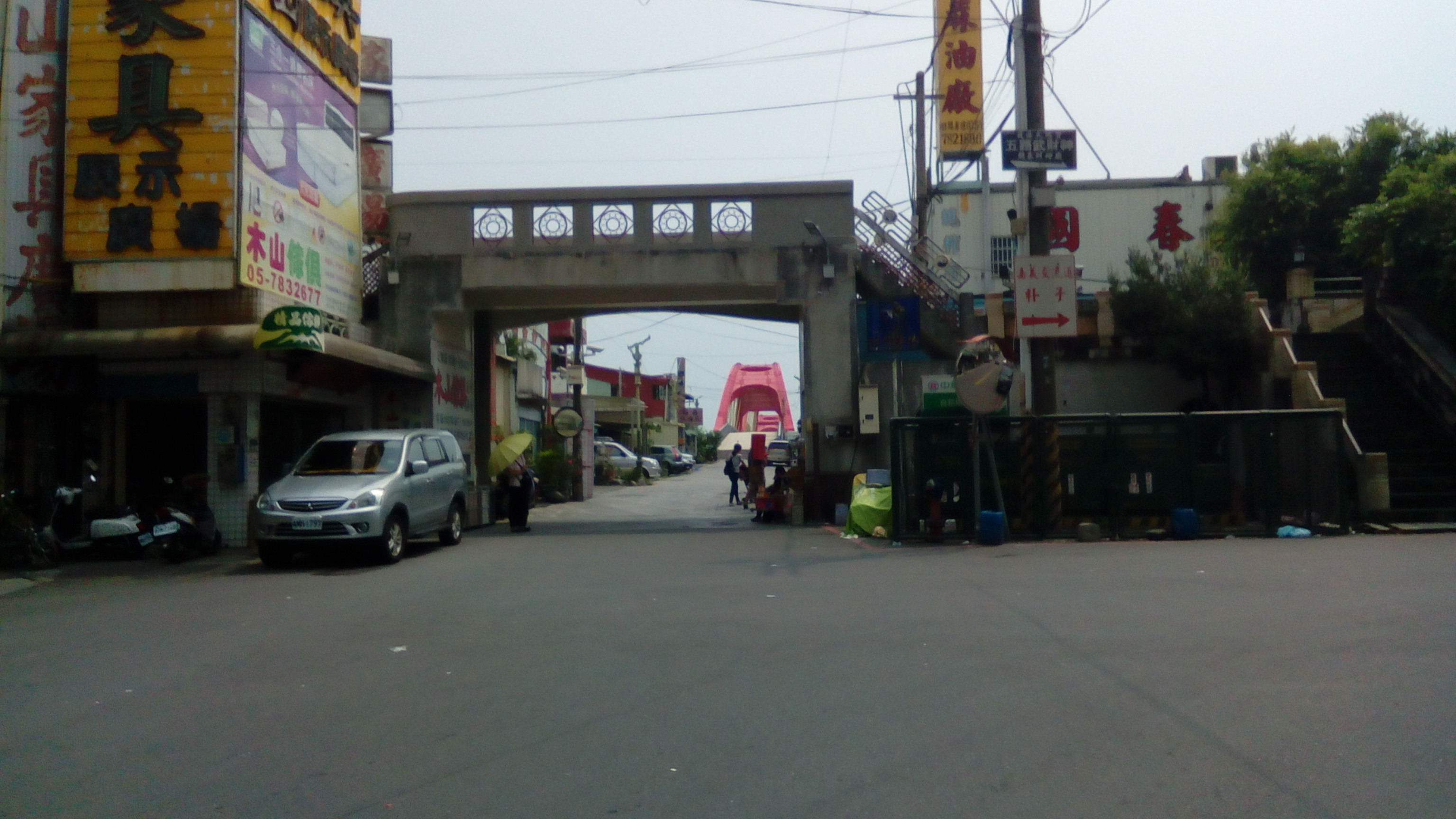 北港老街